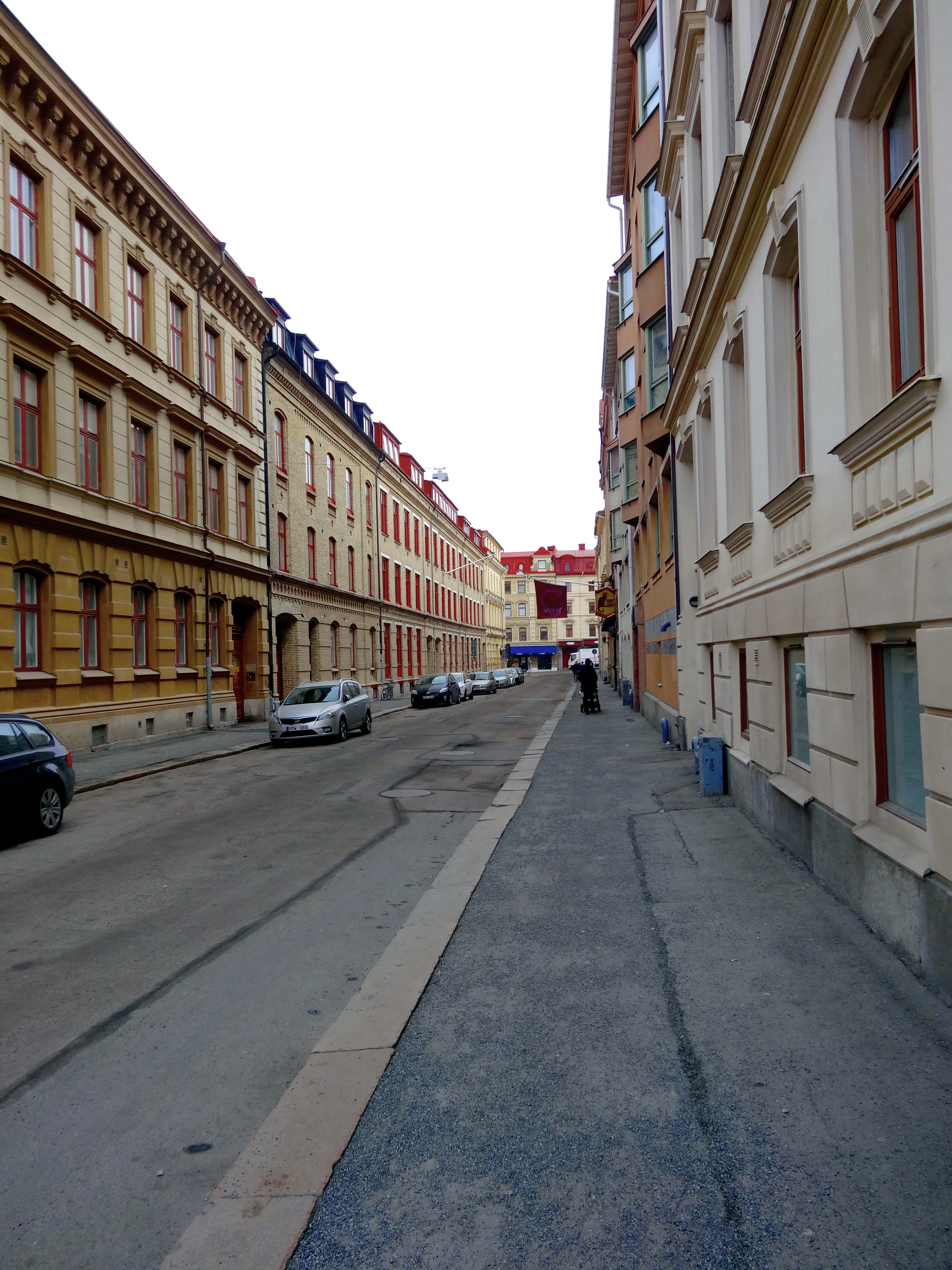 Bellmansgatan i Göteborg.